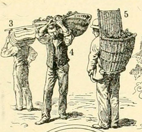 Porteurs de panier (3 Dijon) (4 Beaune-Nuits), de hotte (5 Basse bourgogne)